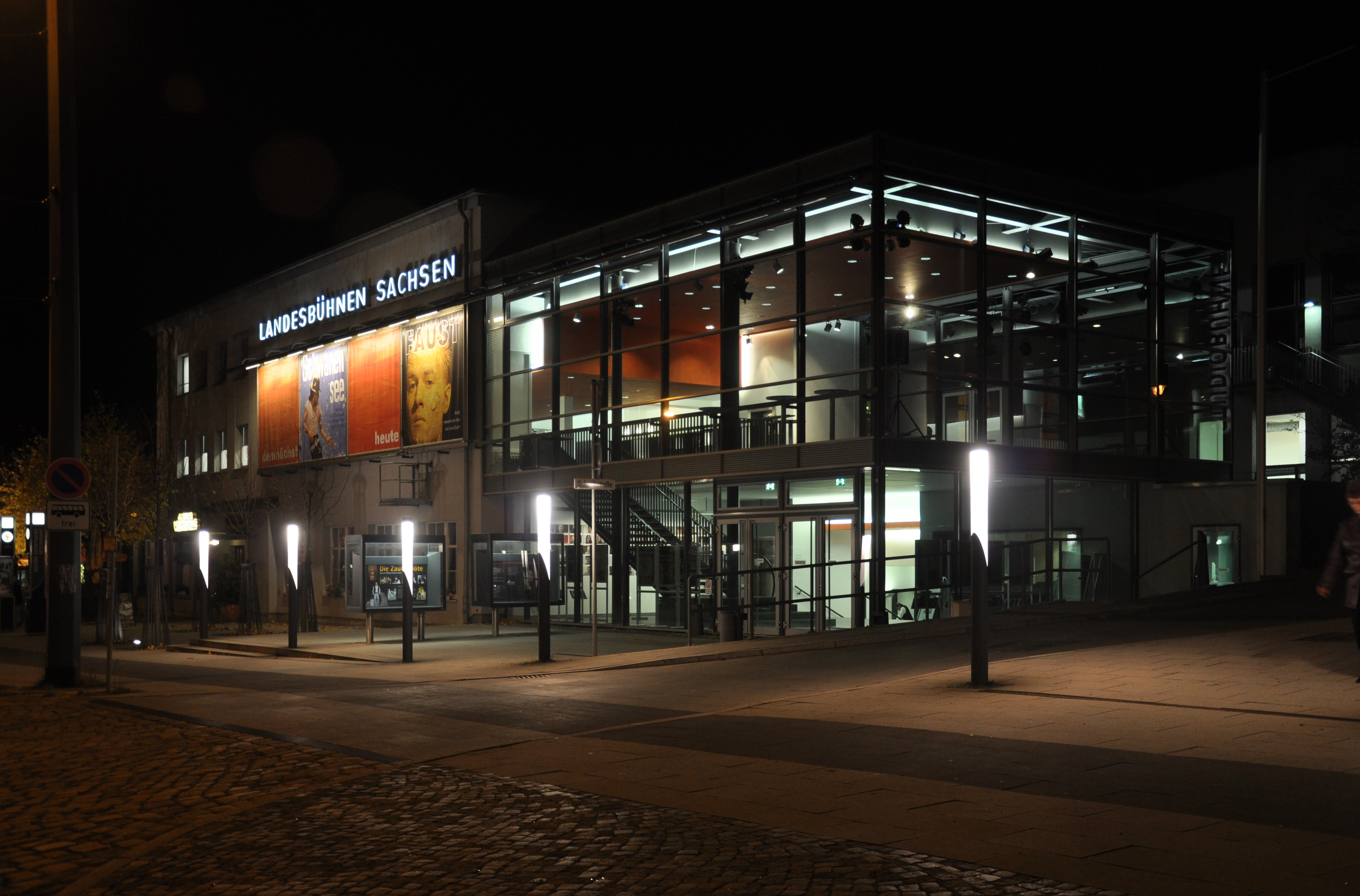 Radebeul (bei Dresden), Landesbühnen Sachsen Außenansicht (nachts)